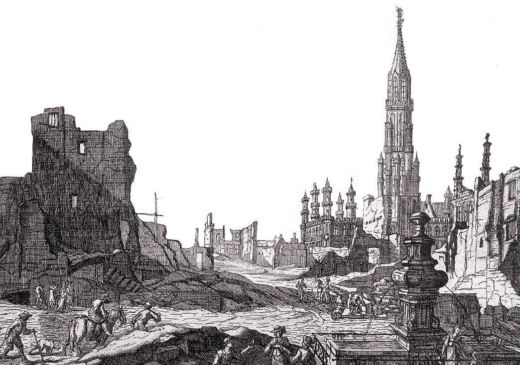 Gravure d'après un dessin de Augustin Coppens représentant la Grand-Place de Bruxelles après le Bombardement de 1695 par les troupes françaises de Louis XIV, de Vue du Marché aux Herbes vers la rue de la Colline et l'Hôtel de Ville (détail)